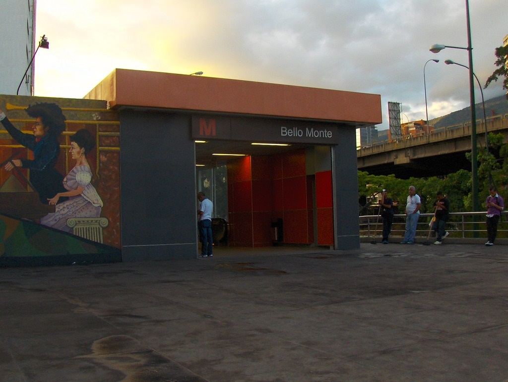 Estación Bello monte metro de Caracas 1 Venezuela